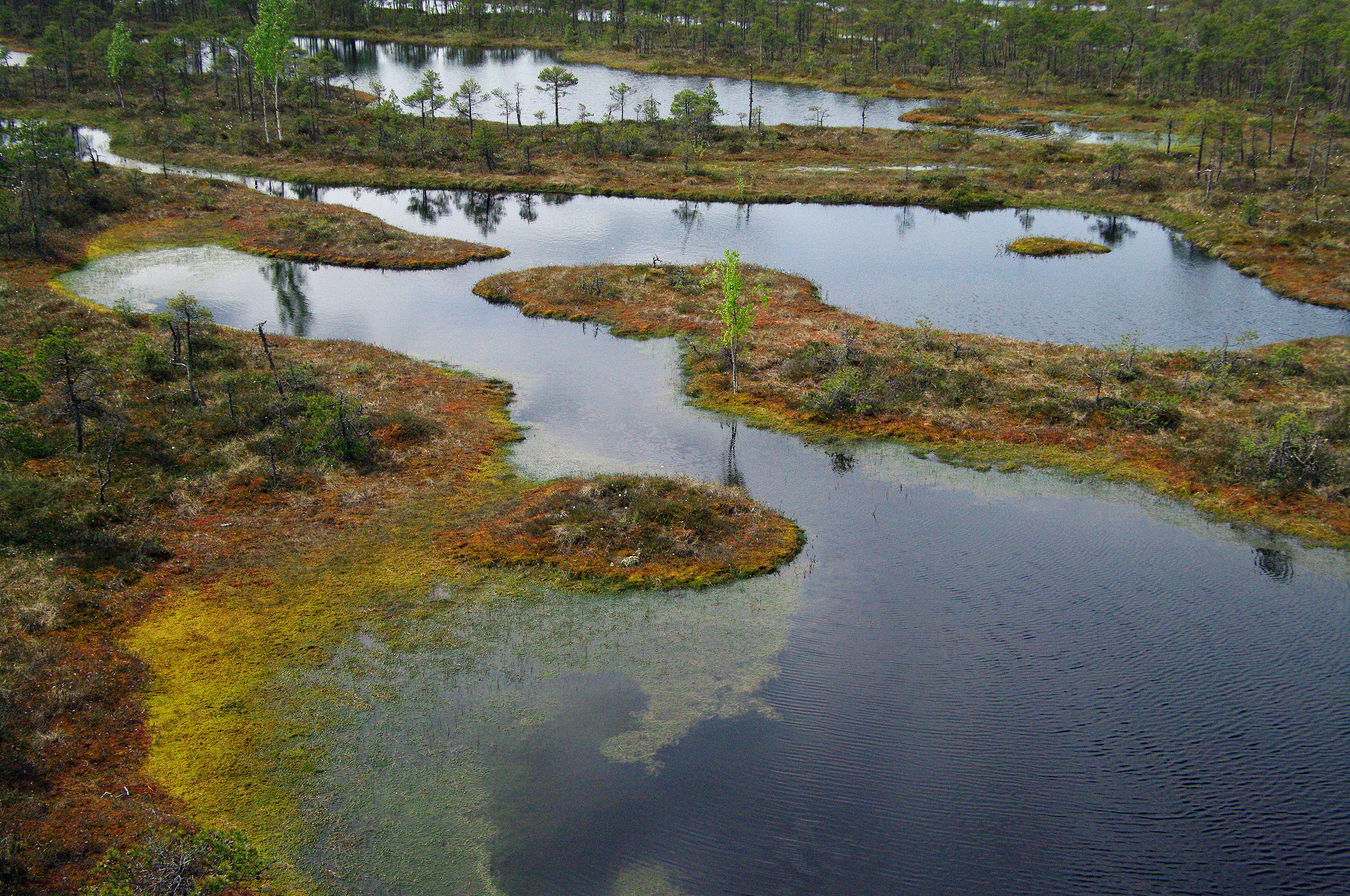 Vaade Männikjärve raba laudteel olevast vaatetornist edela suunas